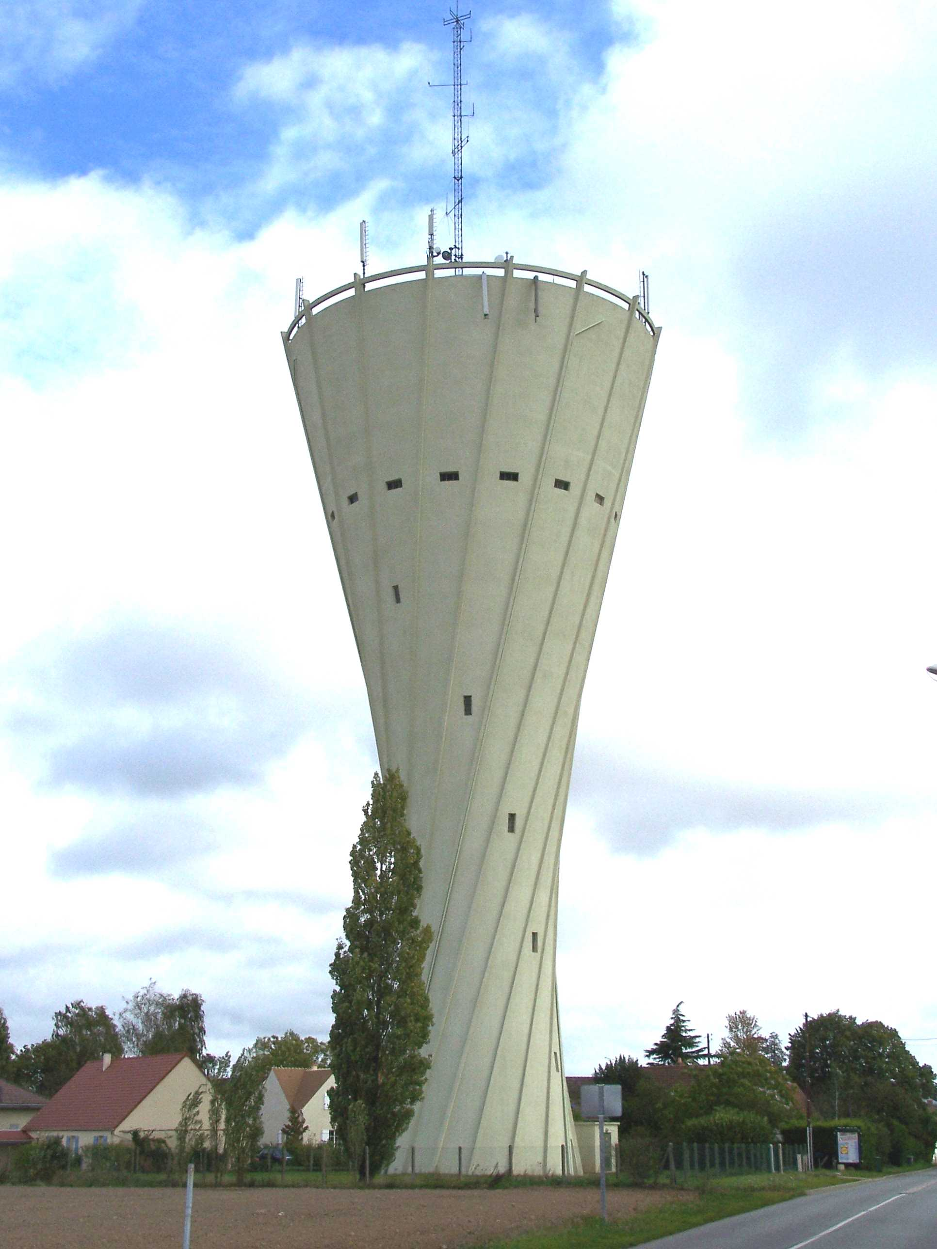 Château d'eau des Essarts-le-Roi (Yvelines, France)